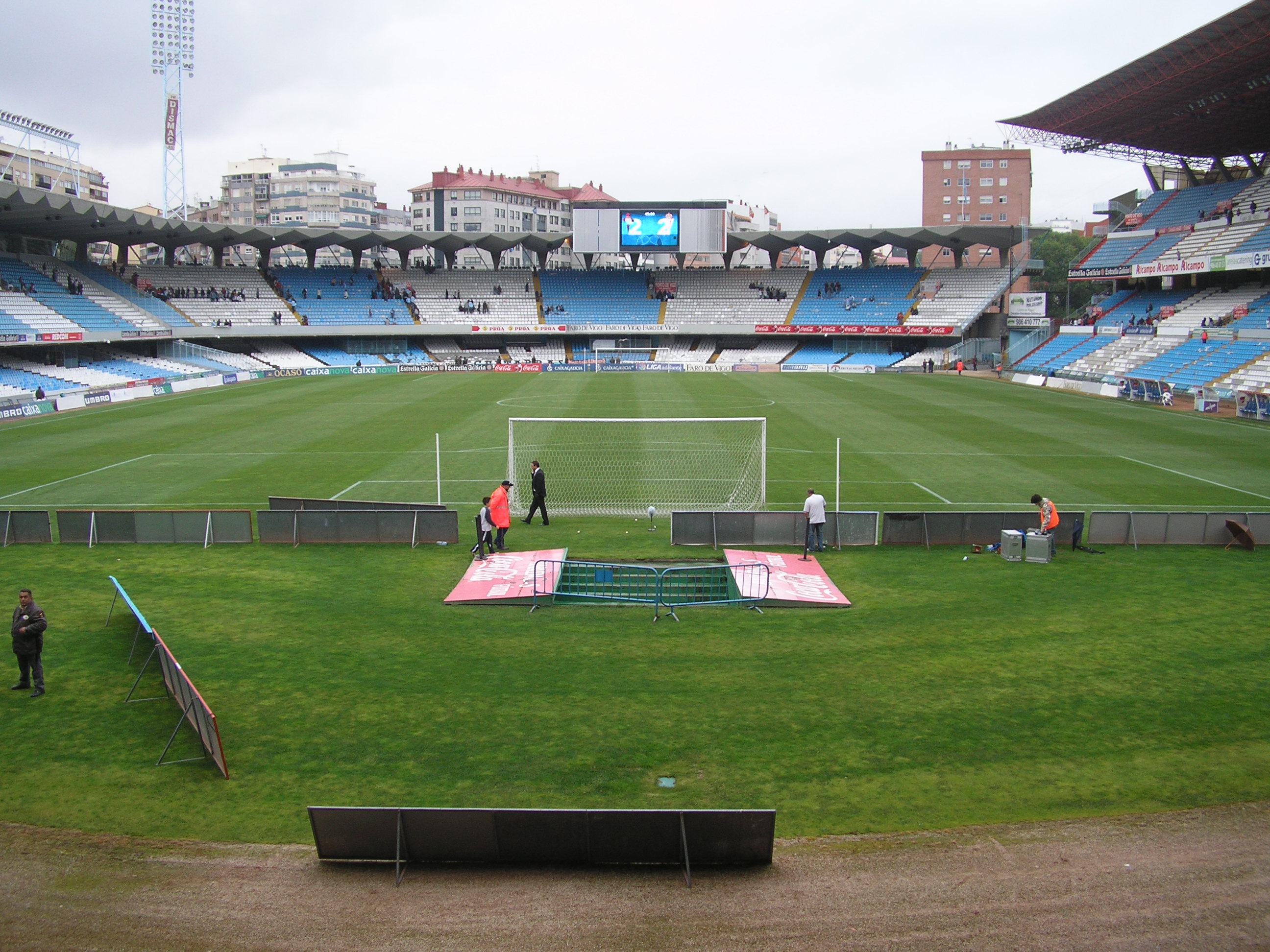 Estadio de Balaídos, Grada Marcador